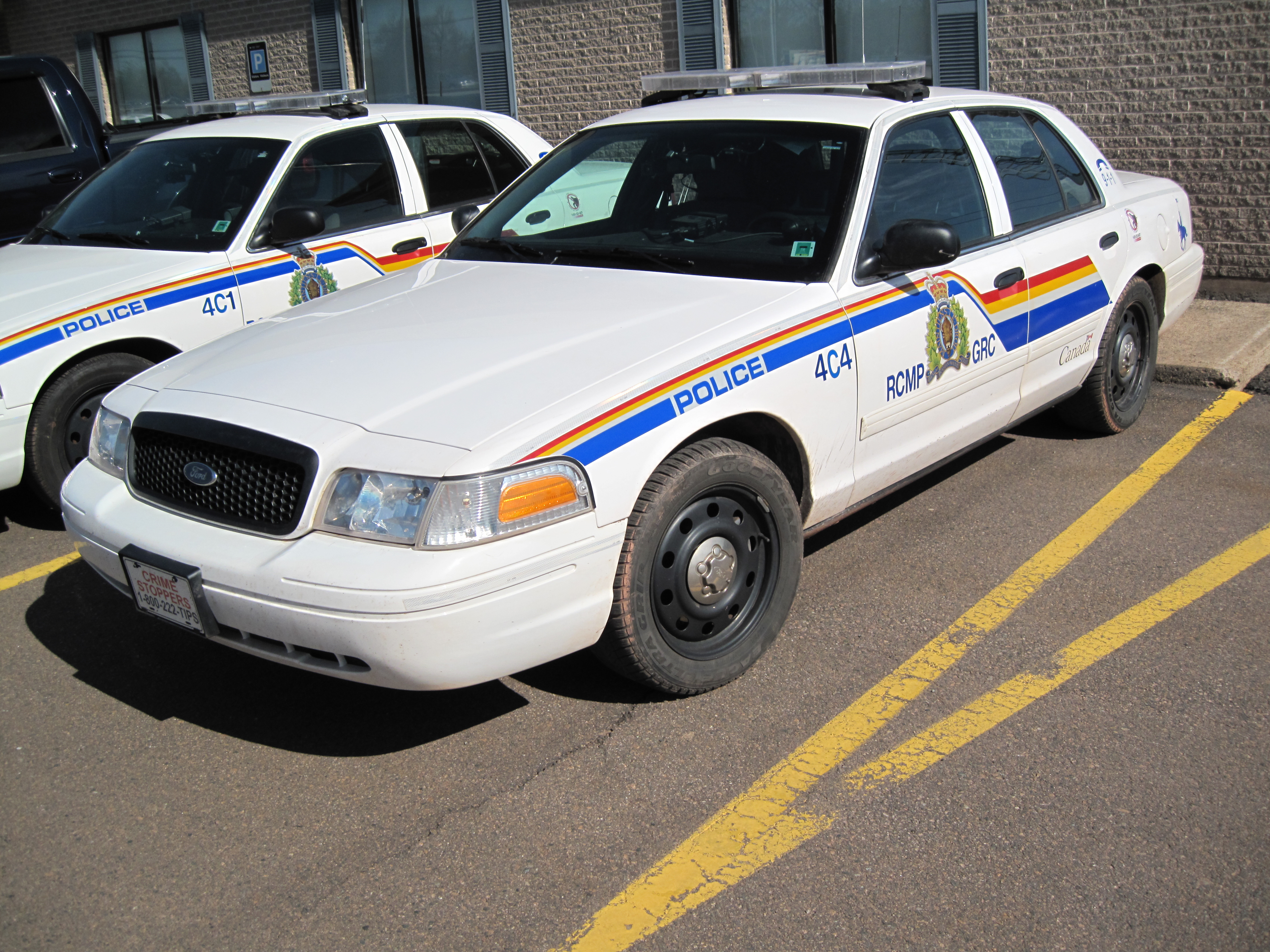 Royal Canadian Mounted Police (politieauto) Canada